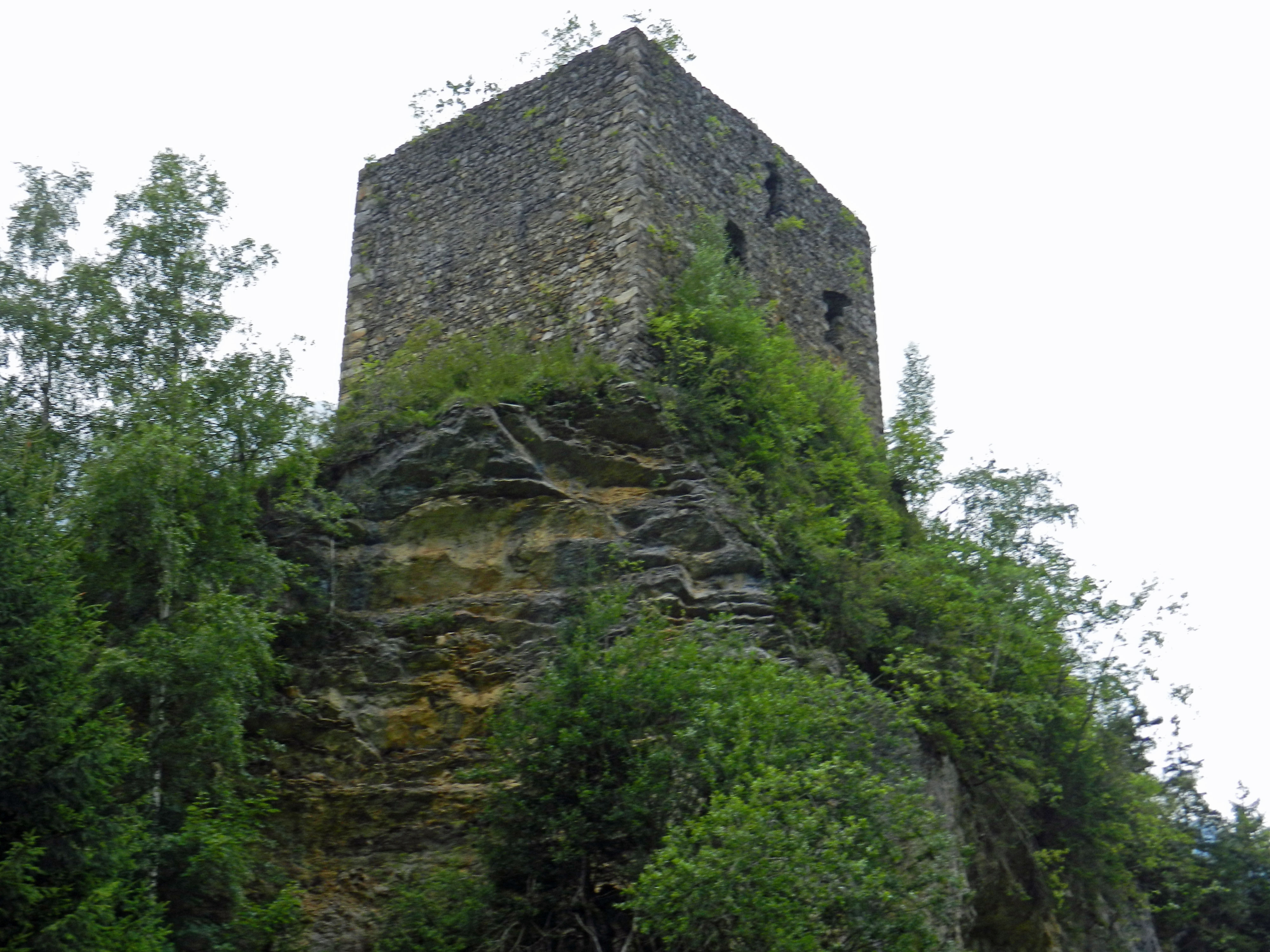 Ruine Felsenburg, Blausee-Mitholz (Gde. Kandergrund, BE). Erbaut durch die Herzöge von Zähringen im 12.Jhdt., bewohnt durch die Freiherren von Kien. 1400 durch die Stadt Bern erworben und 1401 von den Bernern zerstört. In der Folge wurde die Tellenburg in Frutigen ausgebaut und diente als Sitz des Kastlans.